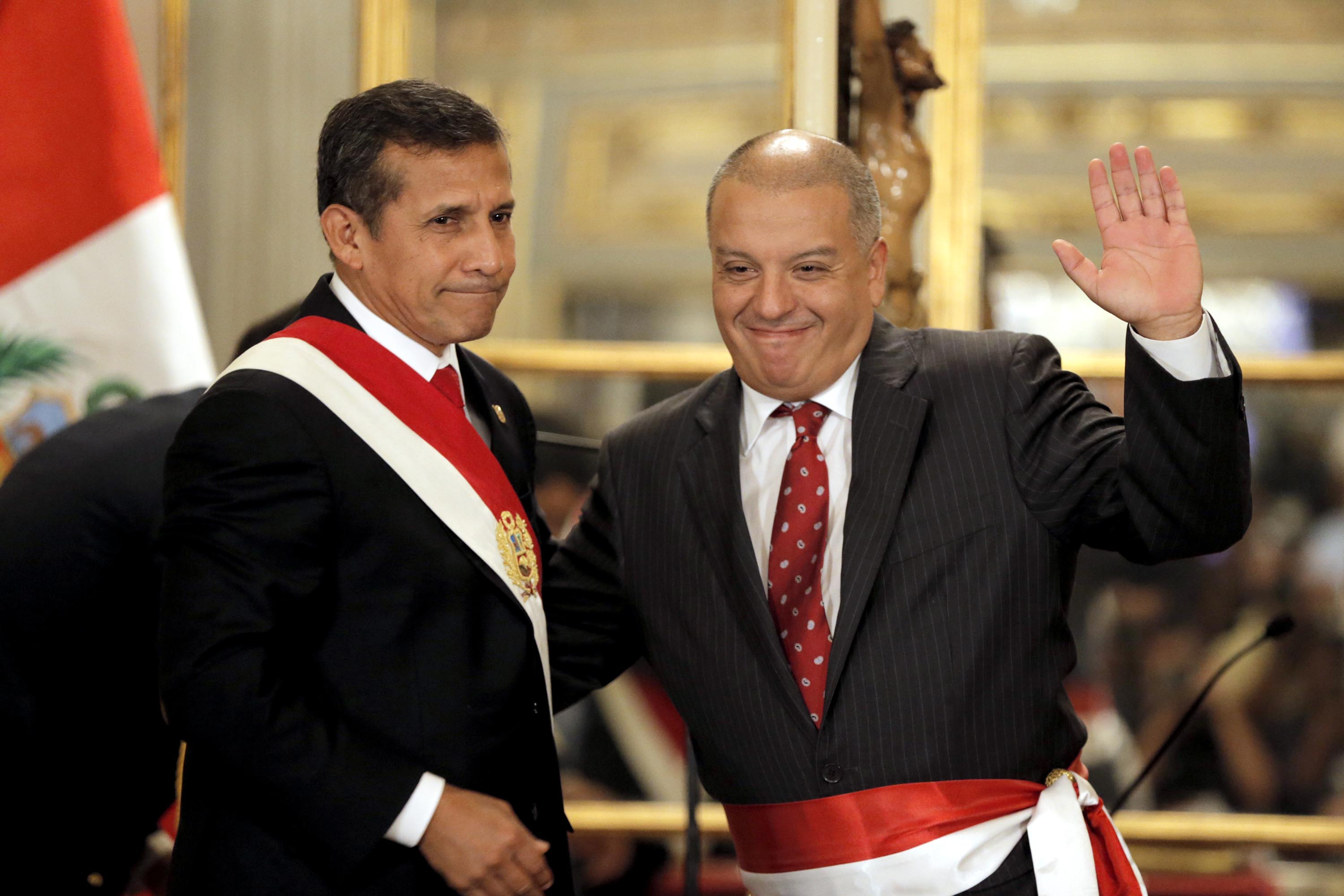 Milto von Hesse, junto con el presidente Ollanta Humala, en la ceremonia de juramentación del gabinete ministerial, 2015.